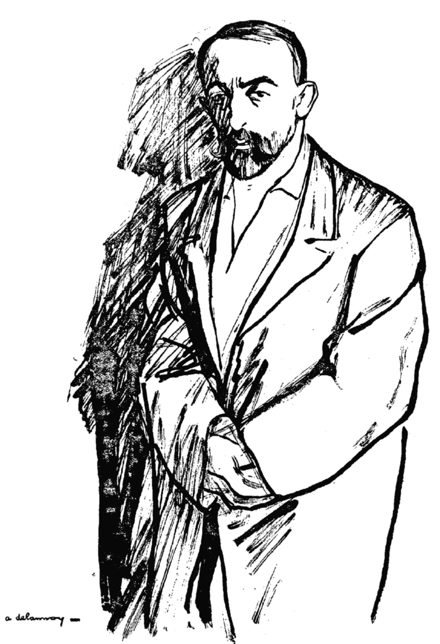 Jehan-Rictus, Dessin de A. Delannoy